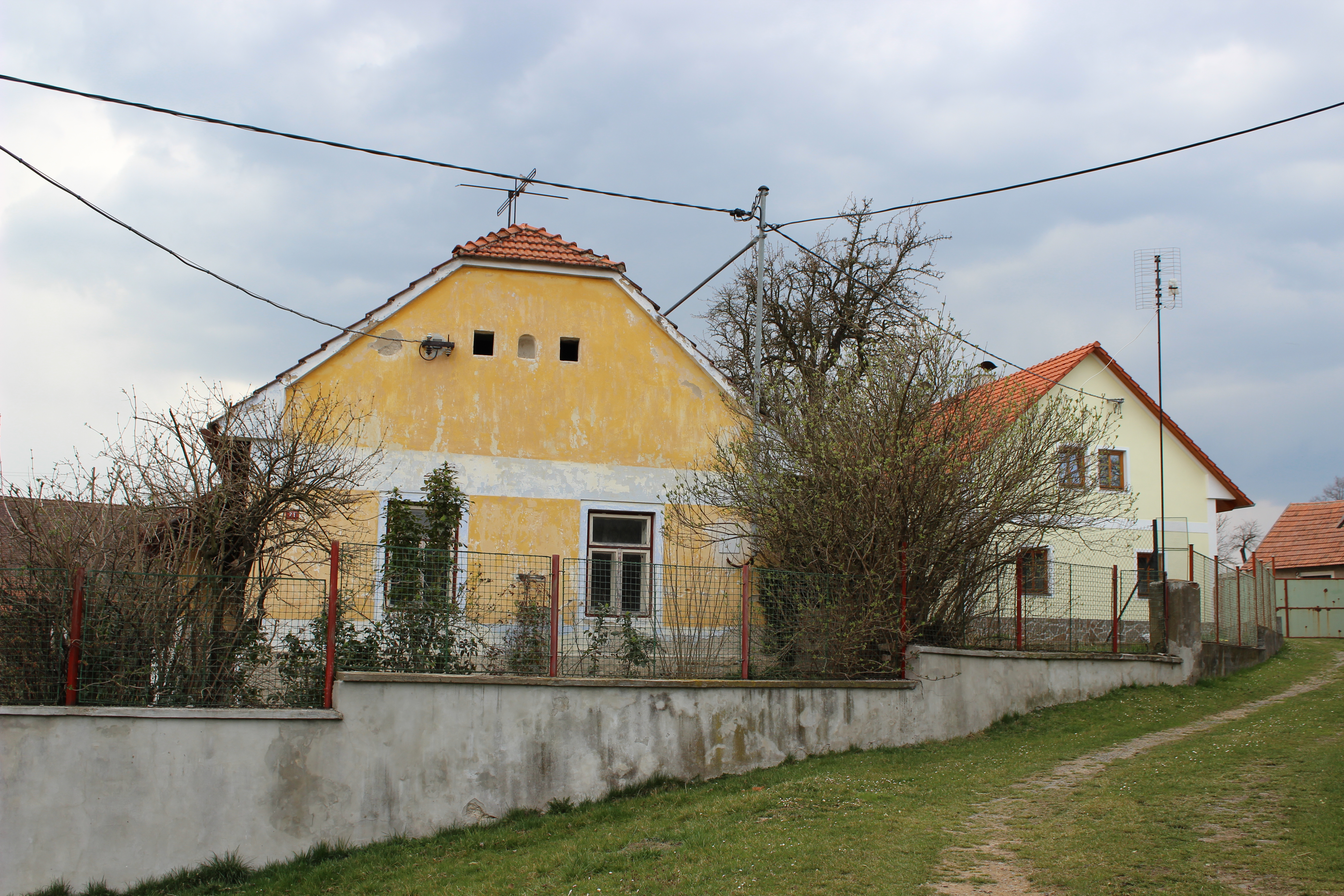 Dům číslo popisné 21 ve Velbězích. V pozadí dům číslo popisné 3 tamtéž. This photograph was taken with a Canon EOS 600D.